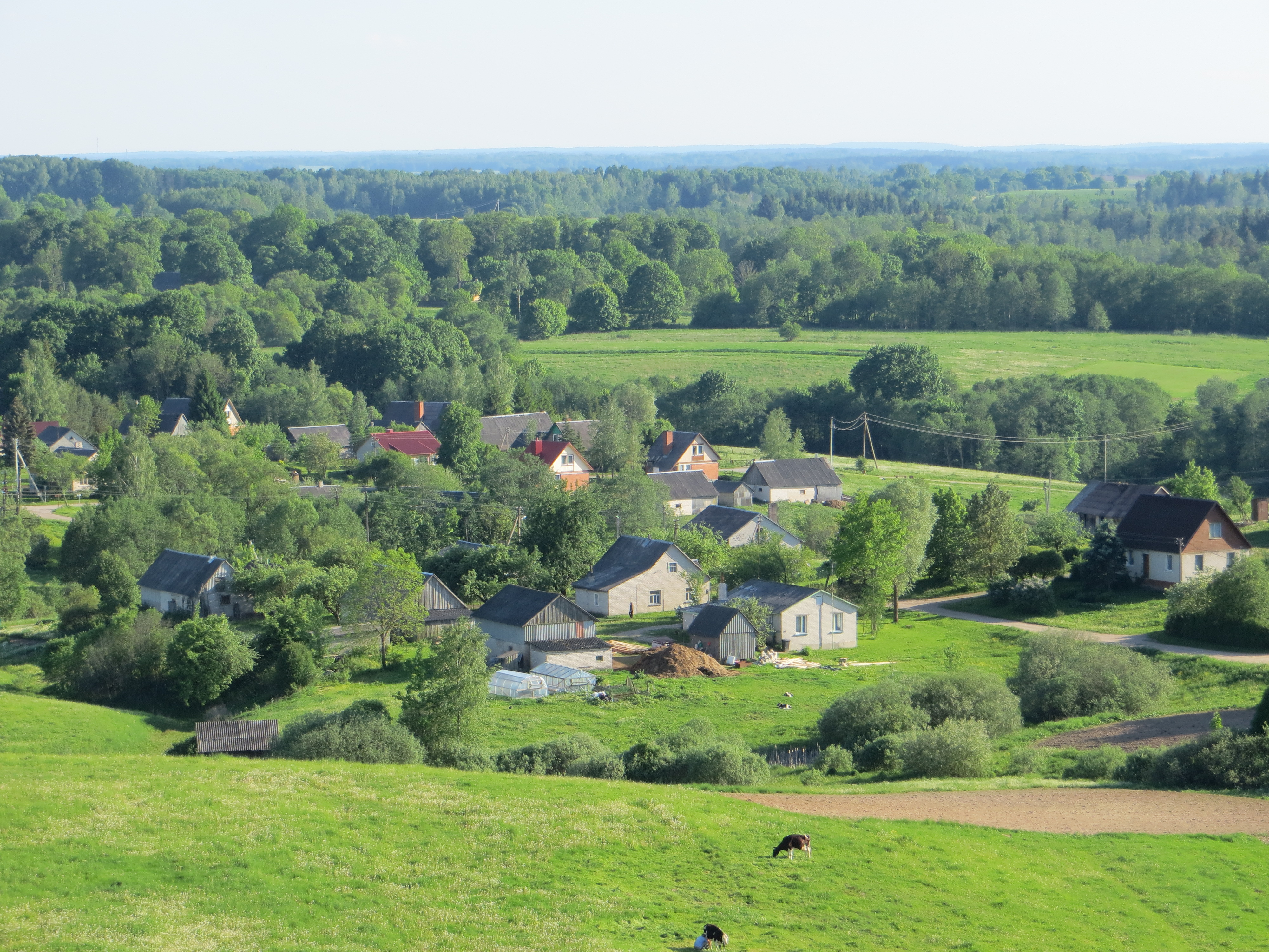 Suginčių sen., Lithuania